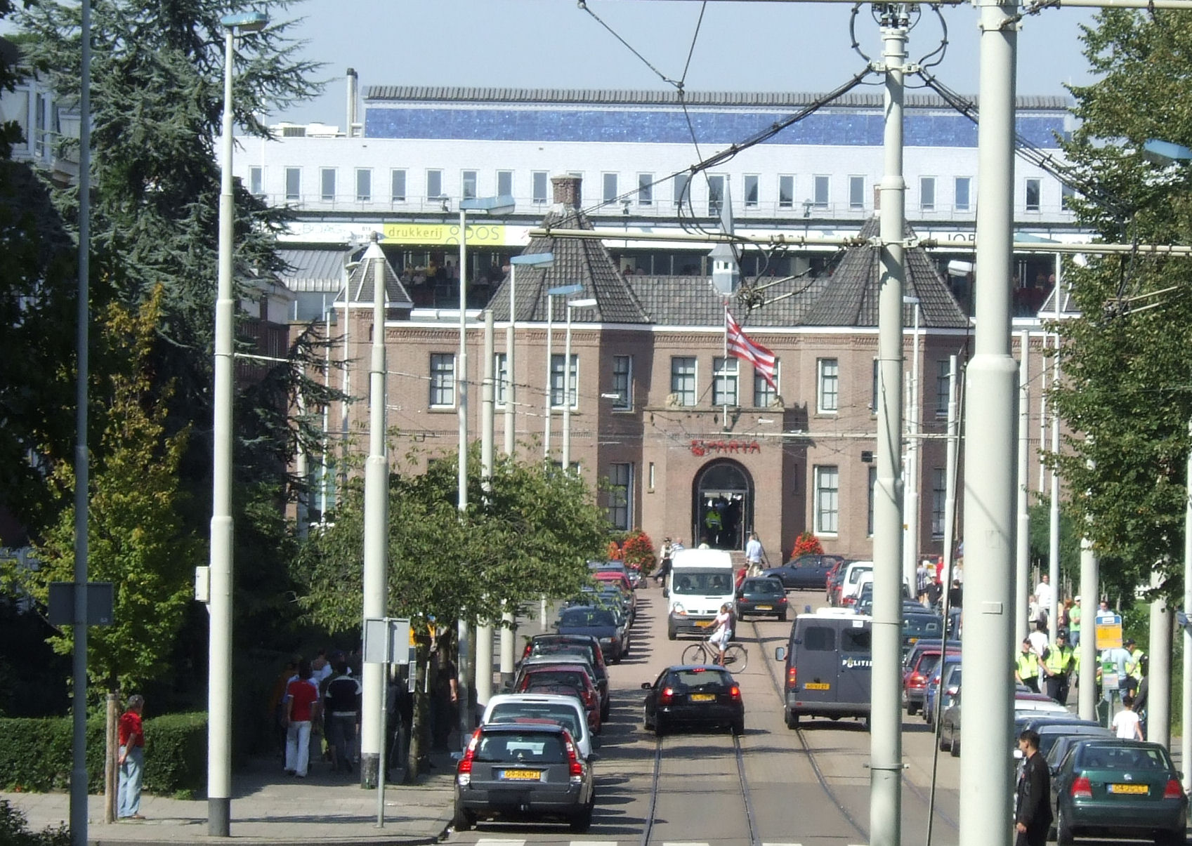 Het Kasteel, het stadion van Sparta, 10 september 2006